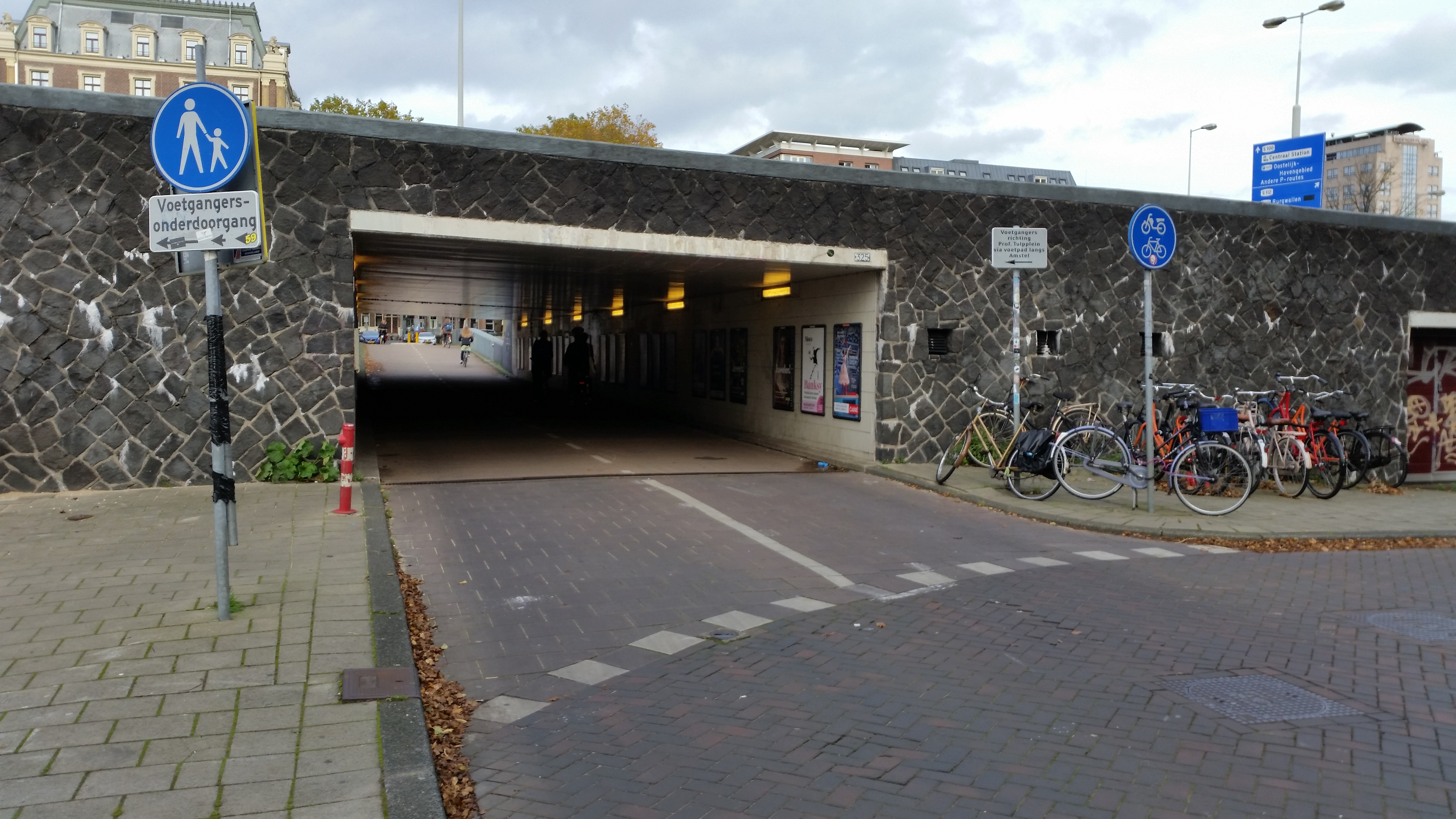 ingang van Brug 325 (in Amsterdam)